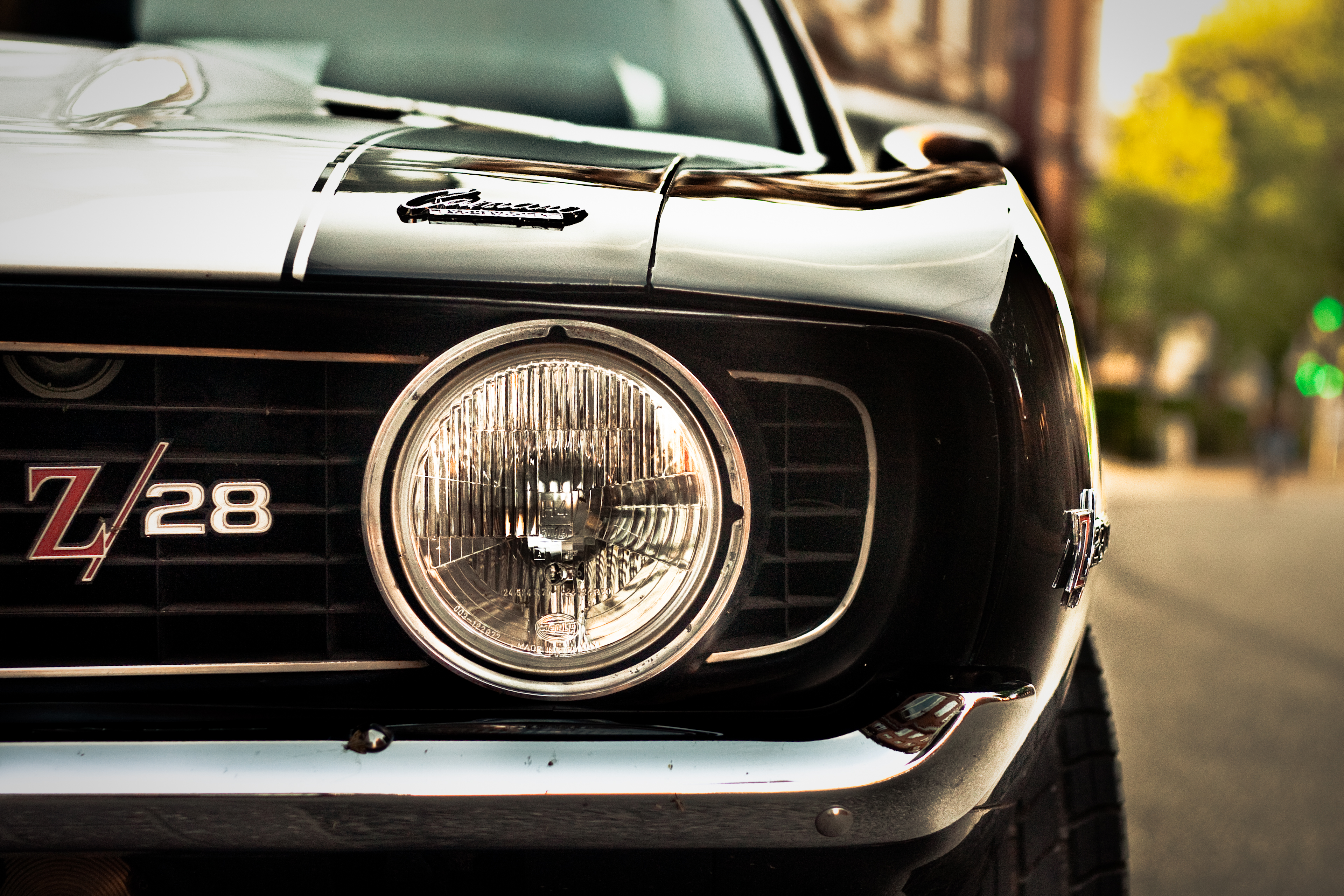 Taken in Odense, Denmark